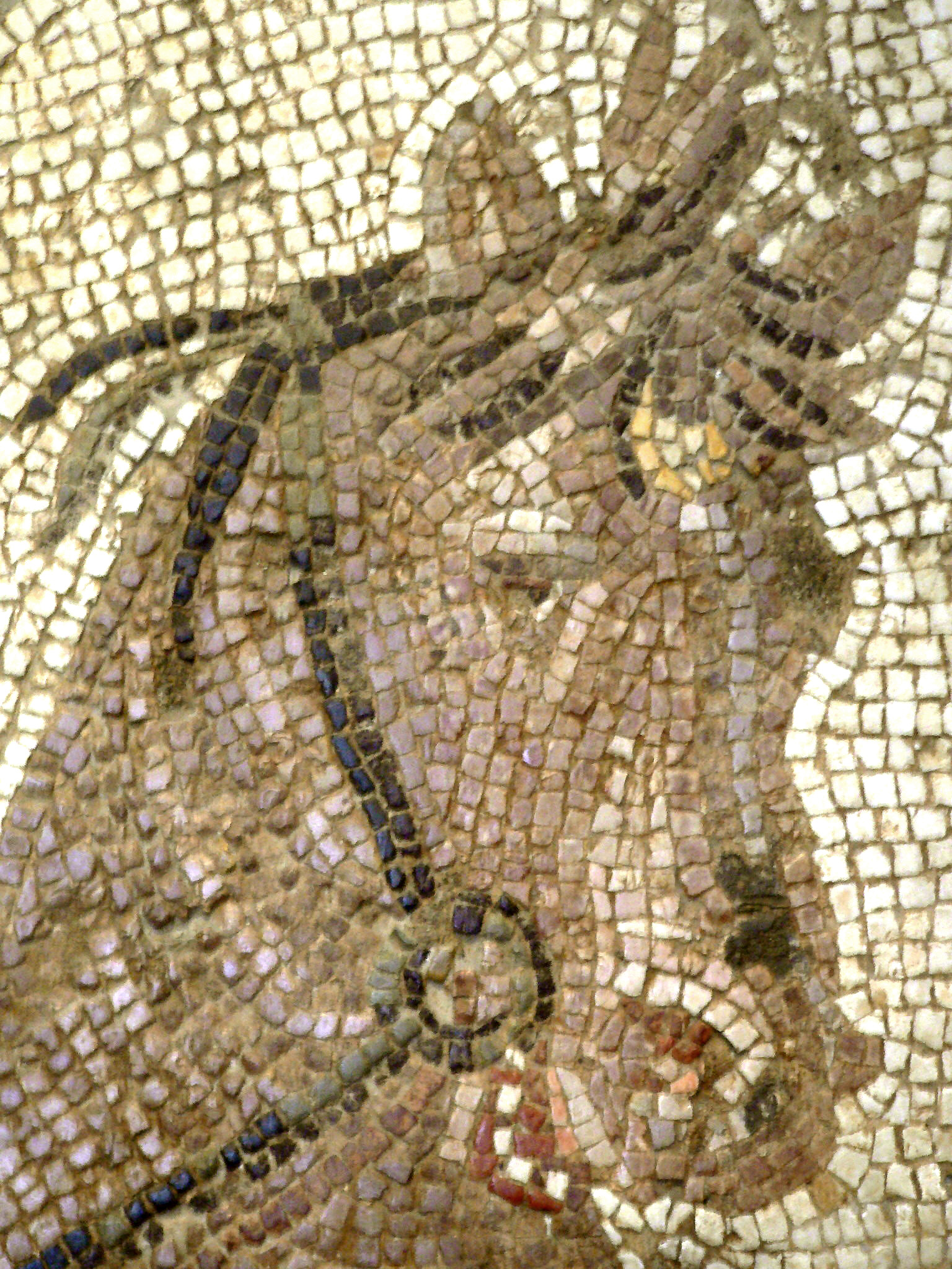 Amazonomachie, 2ème moitié du IV° s. ap. J.-C., Turquie, Daphné (faubourg d'Antioche sur l'Oronte, actuelle Antakya), fragment de mosaïque de pavement, marbre et calcaire.